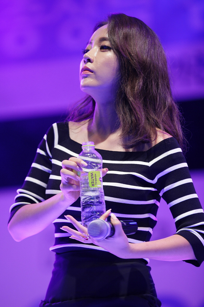 홍진영 가천대학교 메디컬캠퍼스 축제